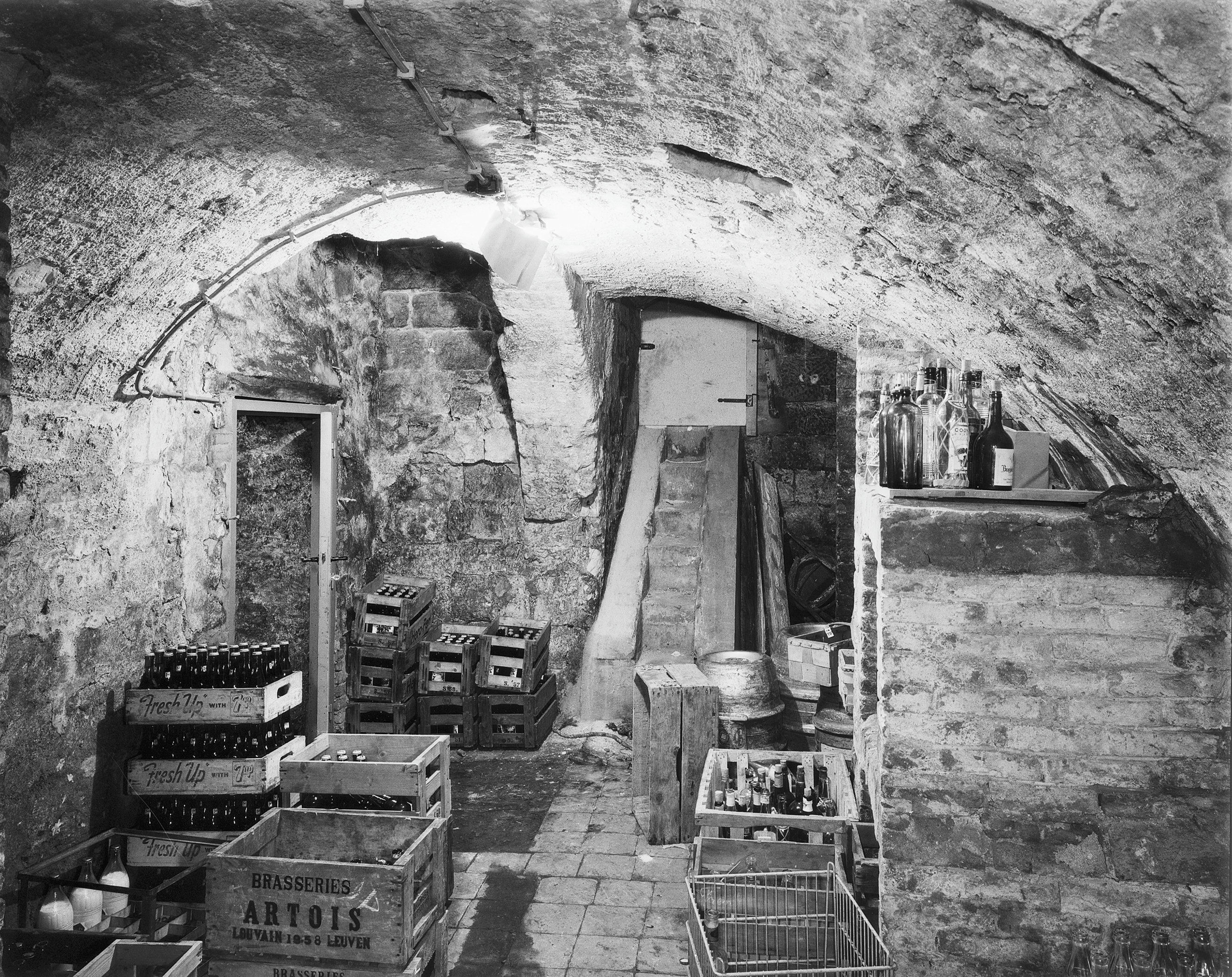 35, interieur kelder